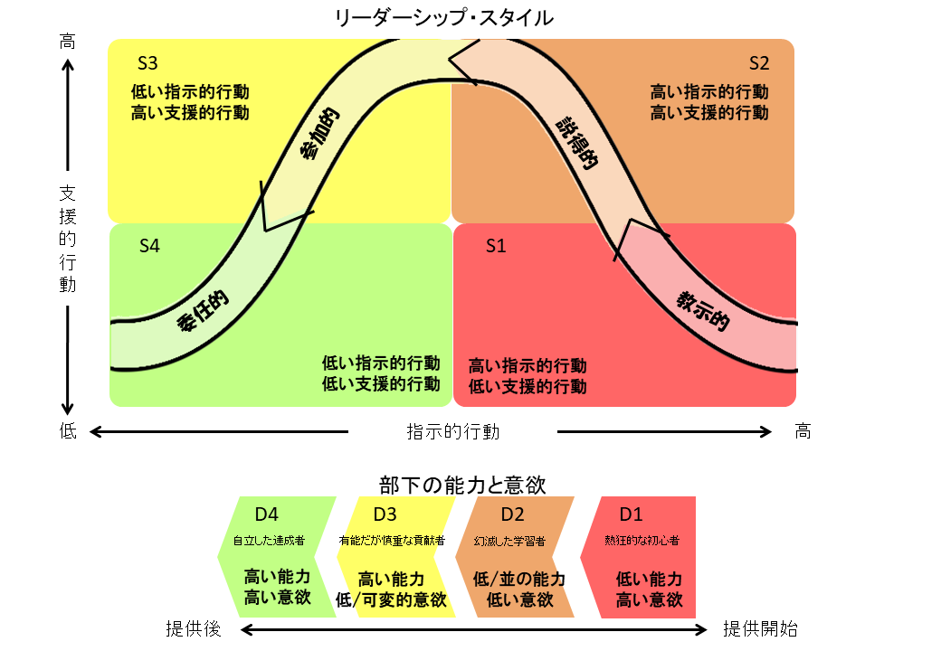 リーダーシップスタイル理論の説明